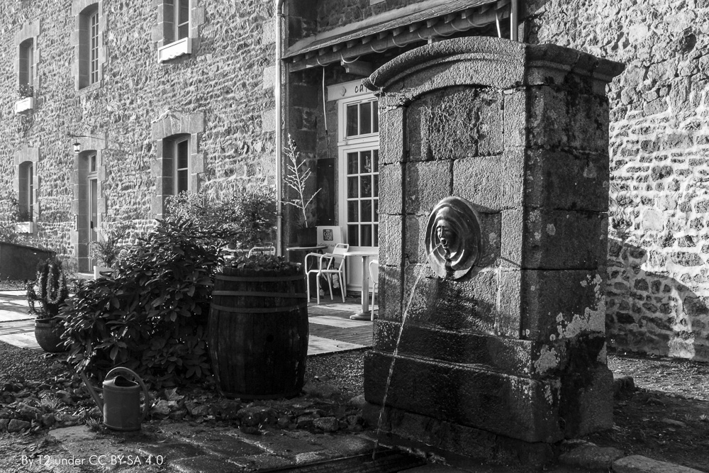 La fontaine, le bar-crèperie et le bâtiment La Cour en 2006.